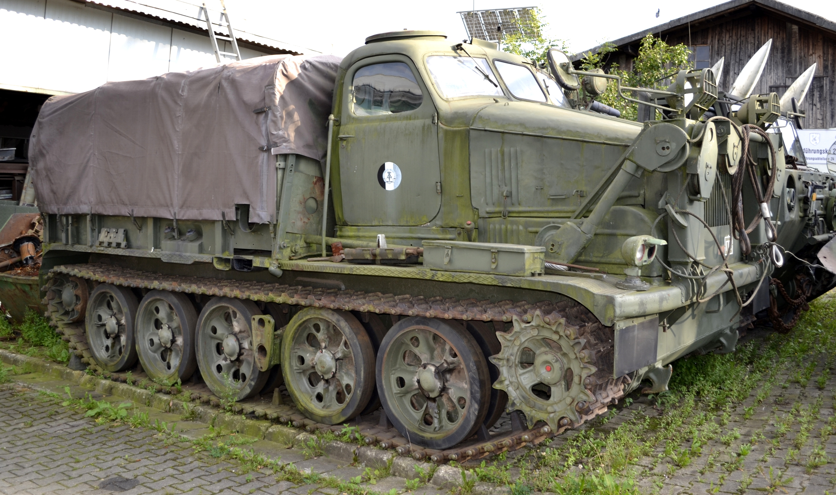 Eine BAT auf Basis AT-T Artilleriezugmaschine aus ehemaligen NVA-Beständen.